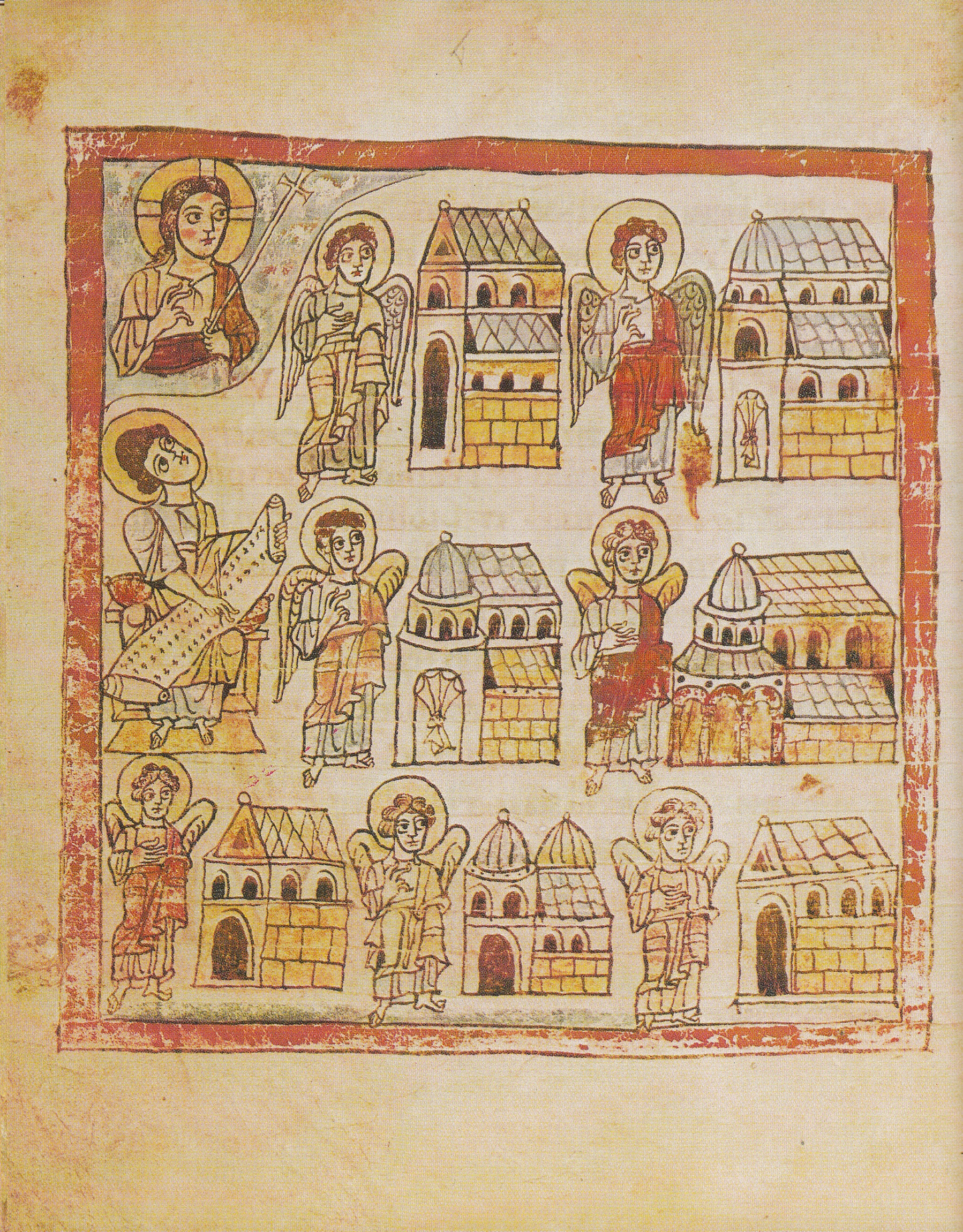 Auftrag an Johannes